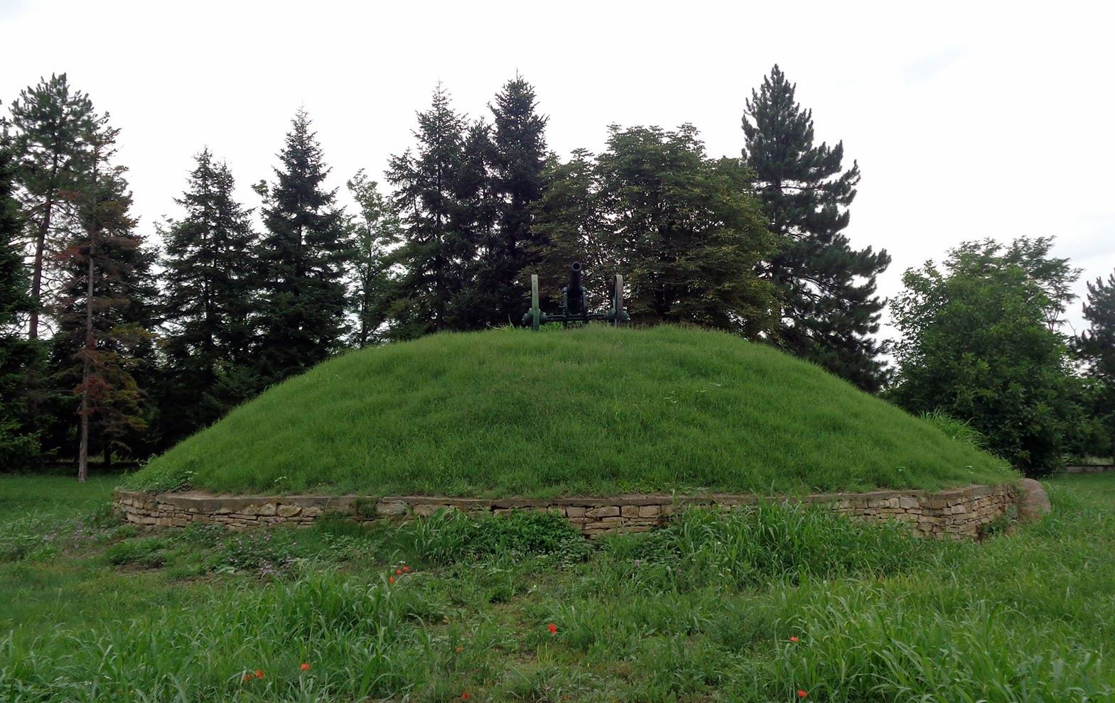 Братска могила на починали от рани след боевете при Никопол, Плевен, Ловеч и Шипка над 3000 руски войни в Руско-турската война 1877 – 1878 г.